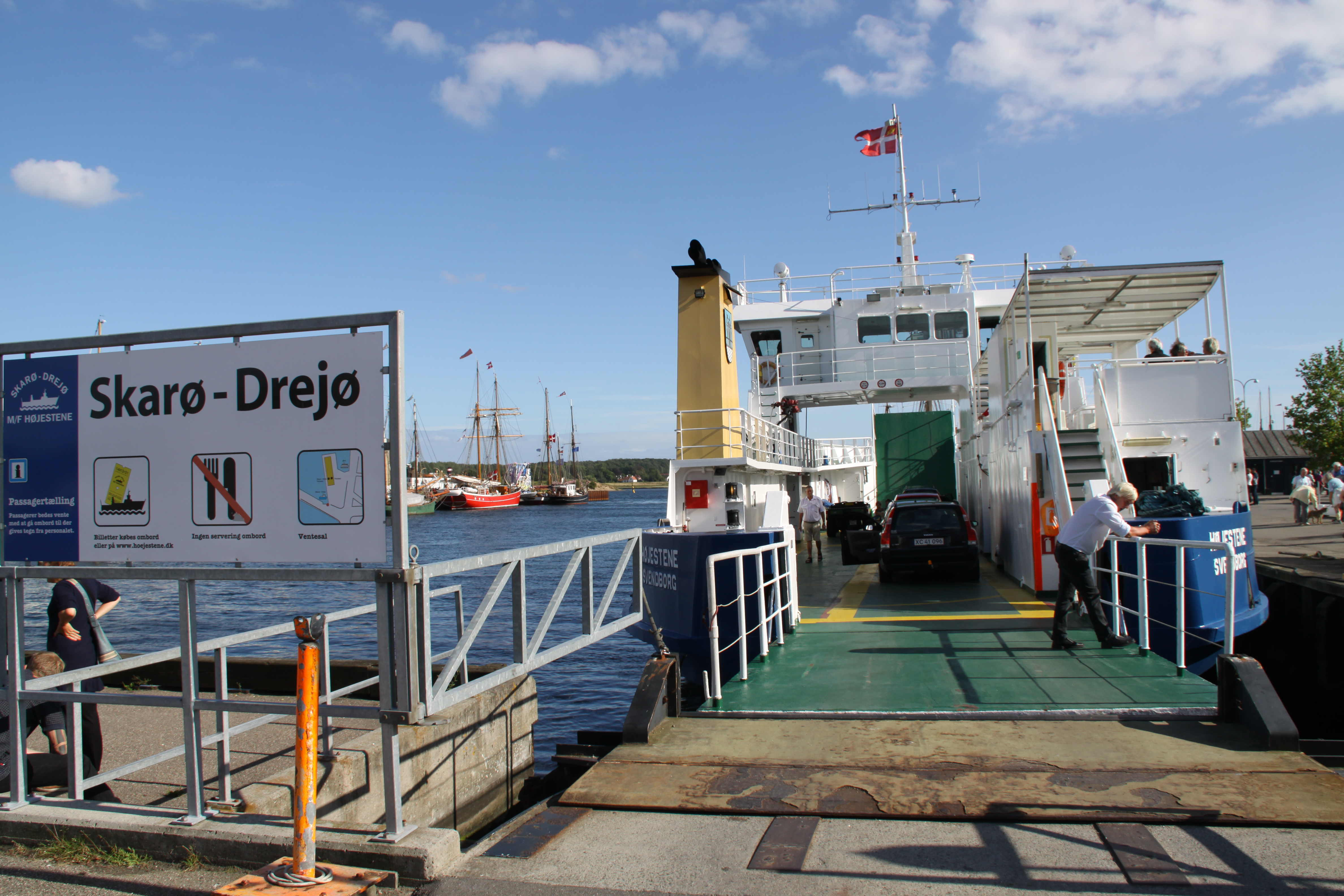 Højestene Heckansicht Svendborg